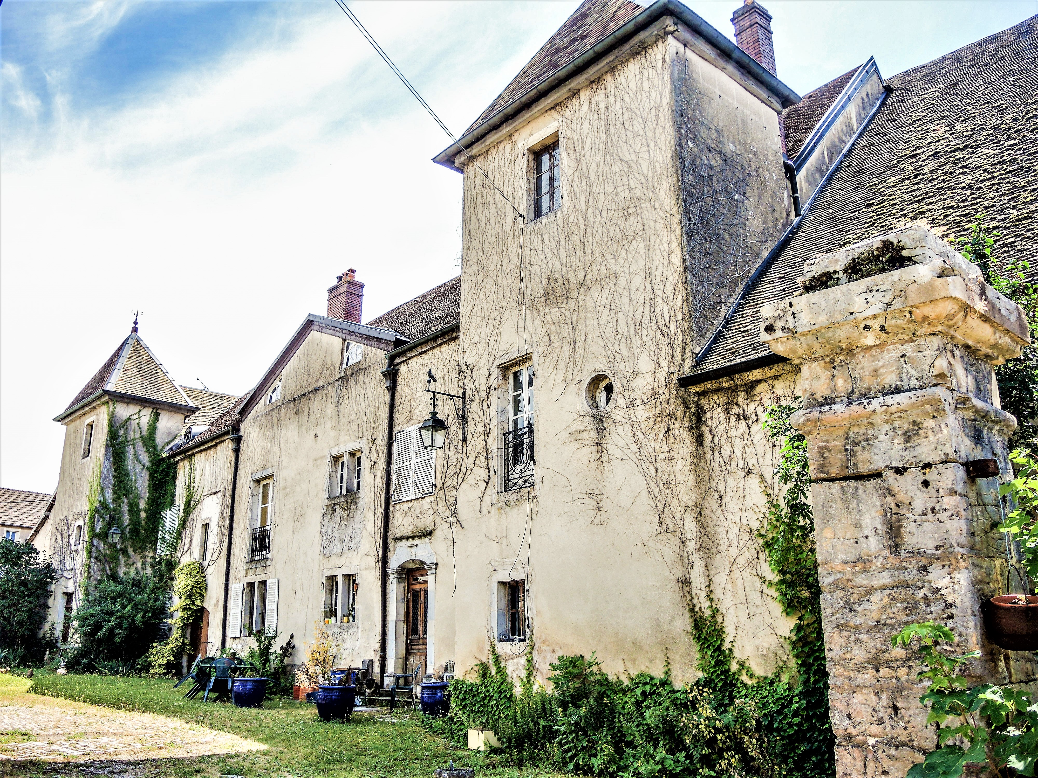 Façade du château